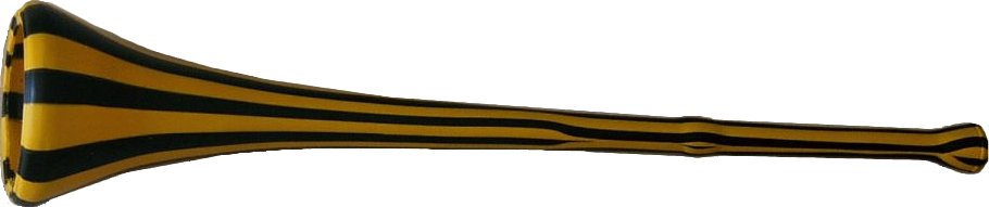 Vuvuzela